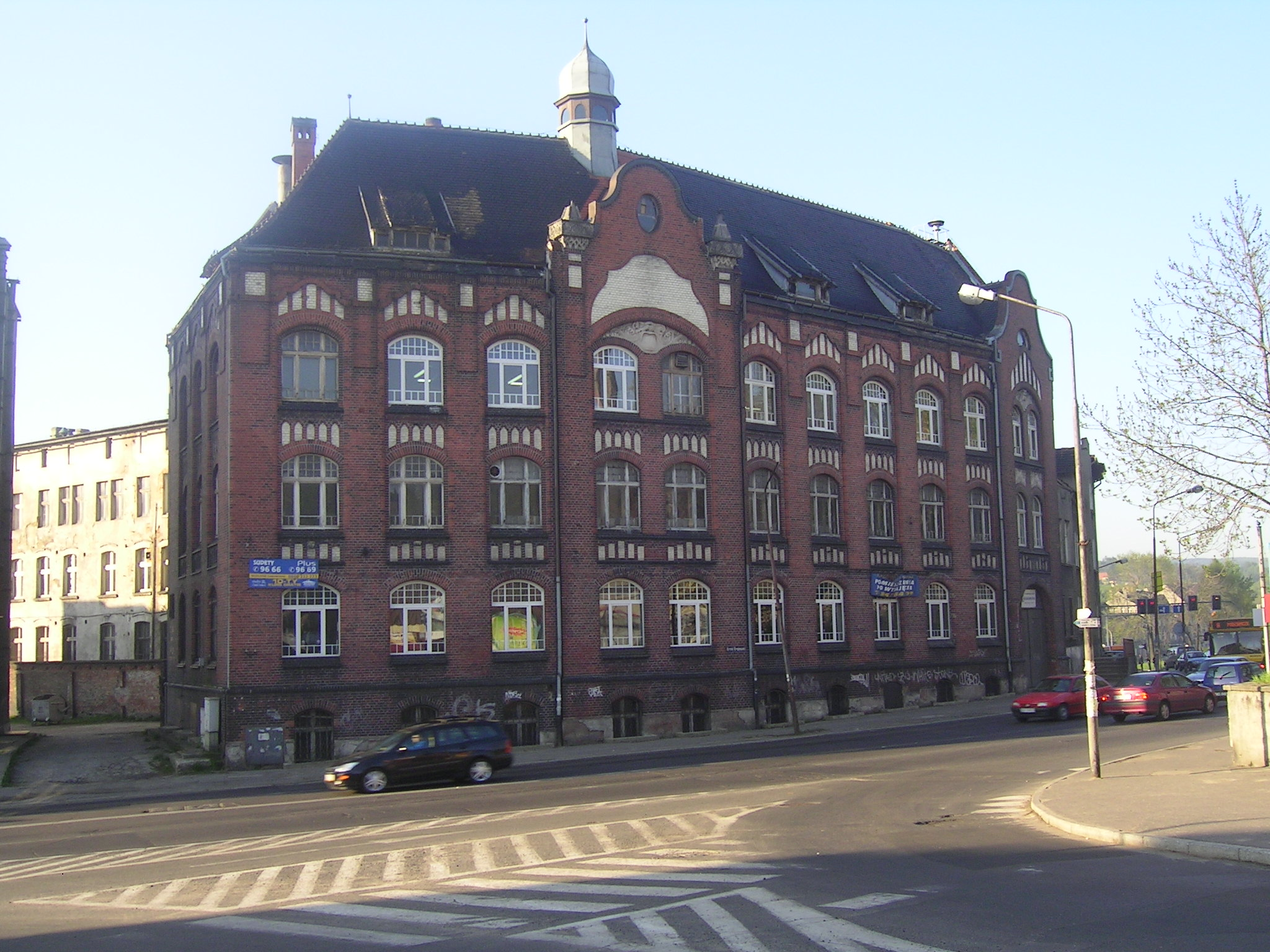 Wałbrzych Stary Zdrój, ul. Armii Krajowej 21 - dawna fabryka Wunderlicha, następnie "Kalkomania", 1896 (zabytek nr 1005/WŁ z 30.03.1981)